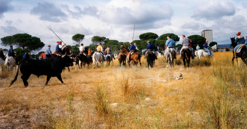 Fiestas Toro de la Vega. Tordesillas (Valladolid). Toro de la Vega, año 1993, de nombre "Bonito". Indultado